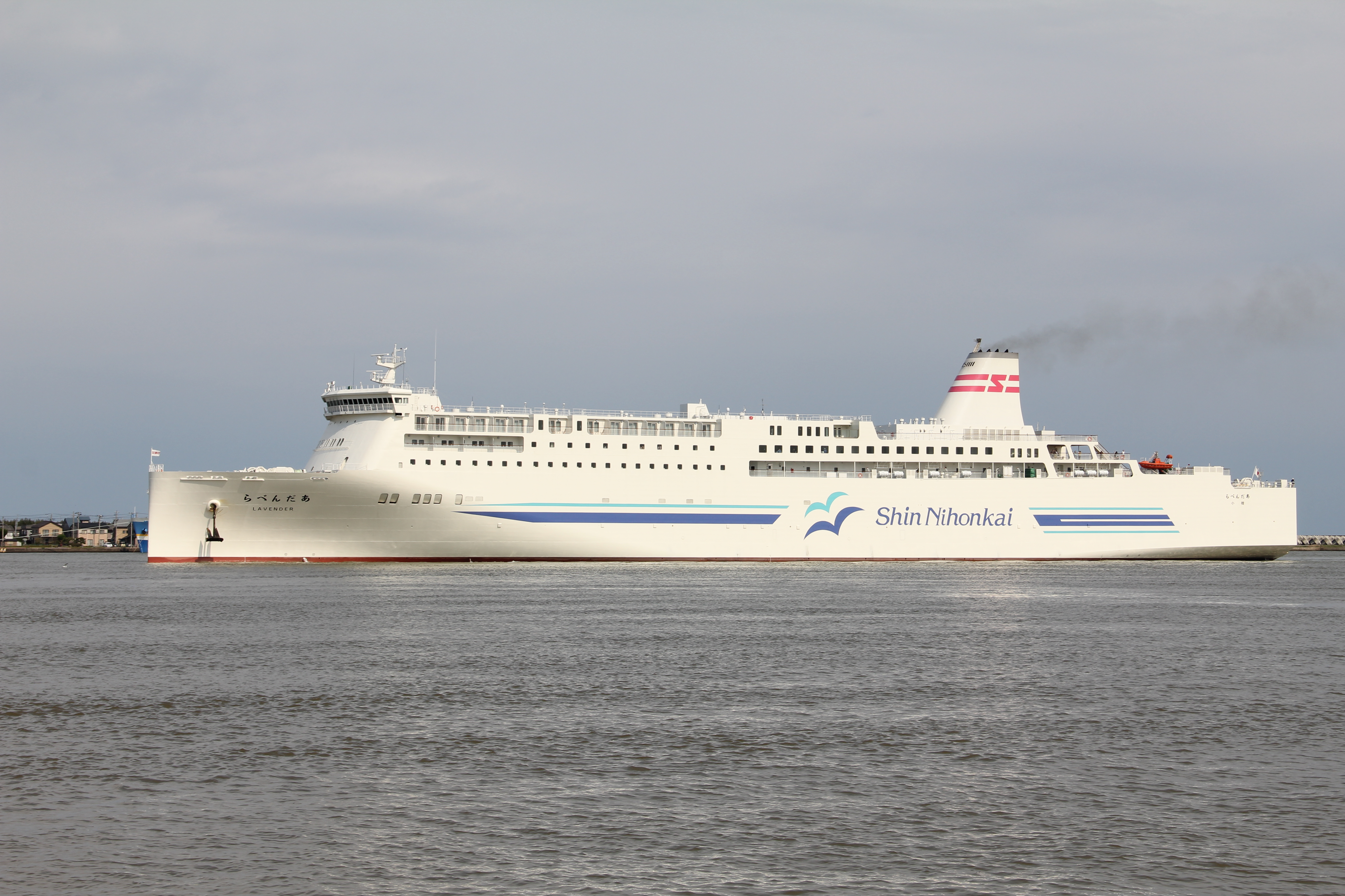 2017年4月29日 新潟港で撮影